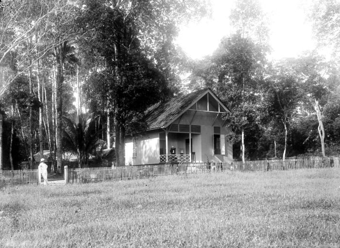 Negatief. Beambtenwoning op Tandjong Pandan